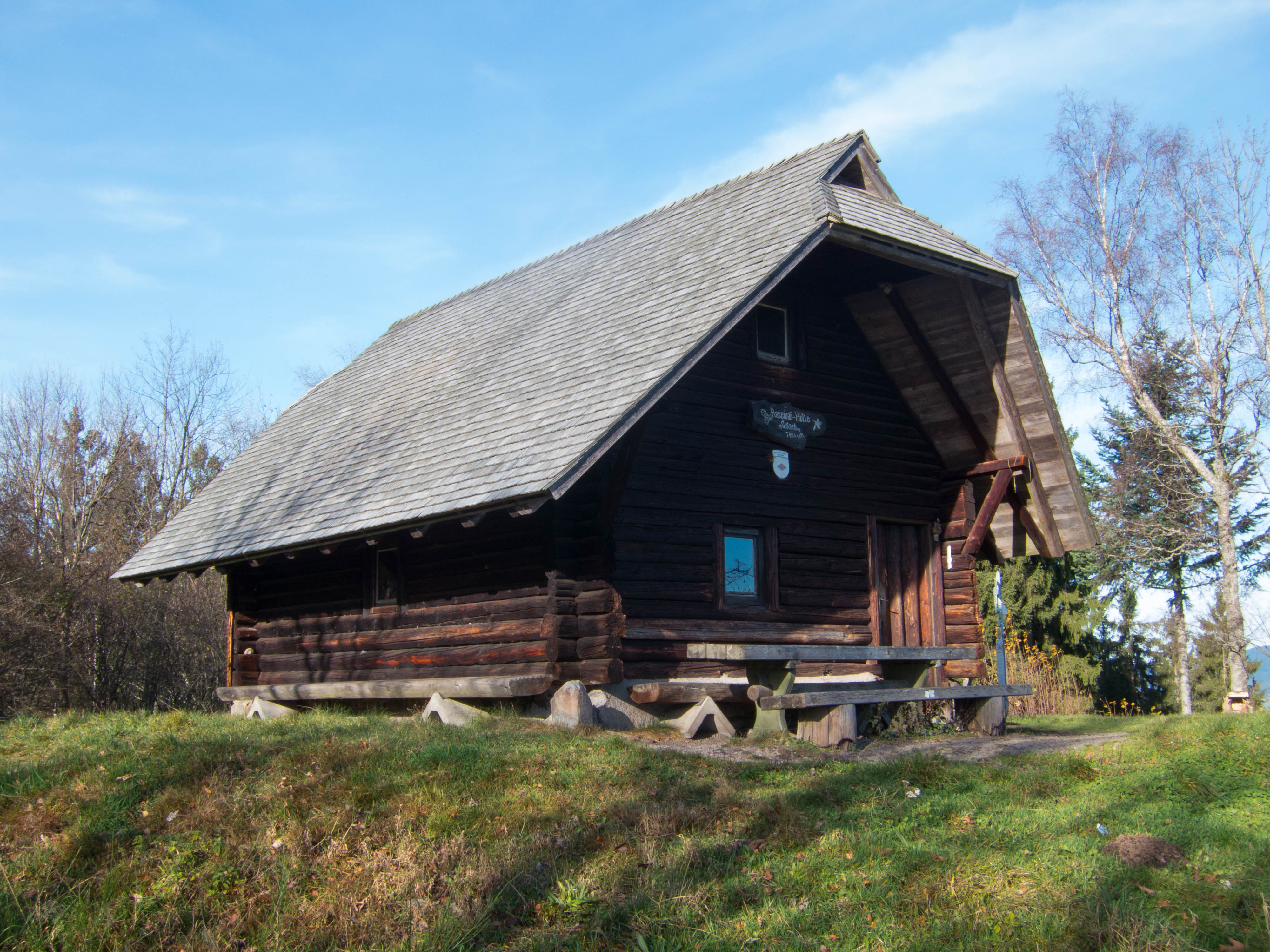 Hasemann-Hütte auf dem Farrenkopf bei Gutach im Schwarzwald